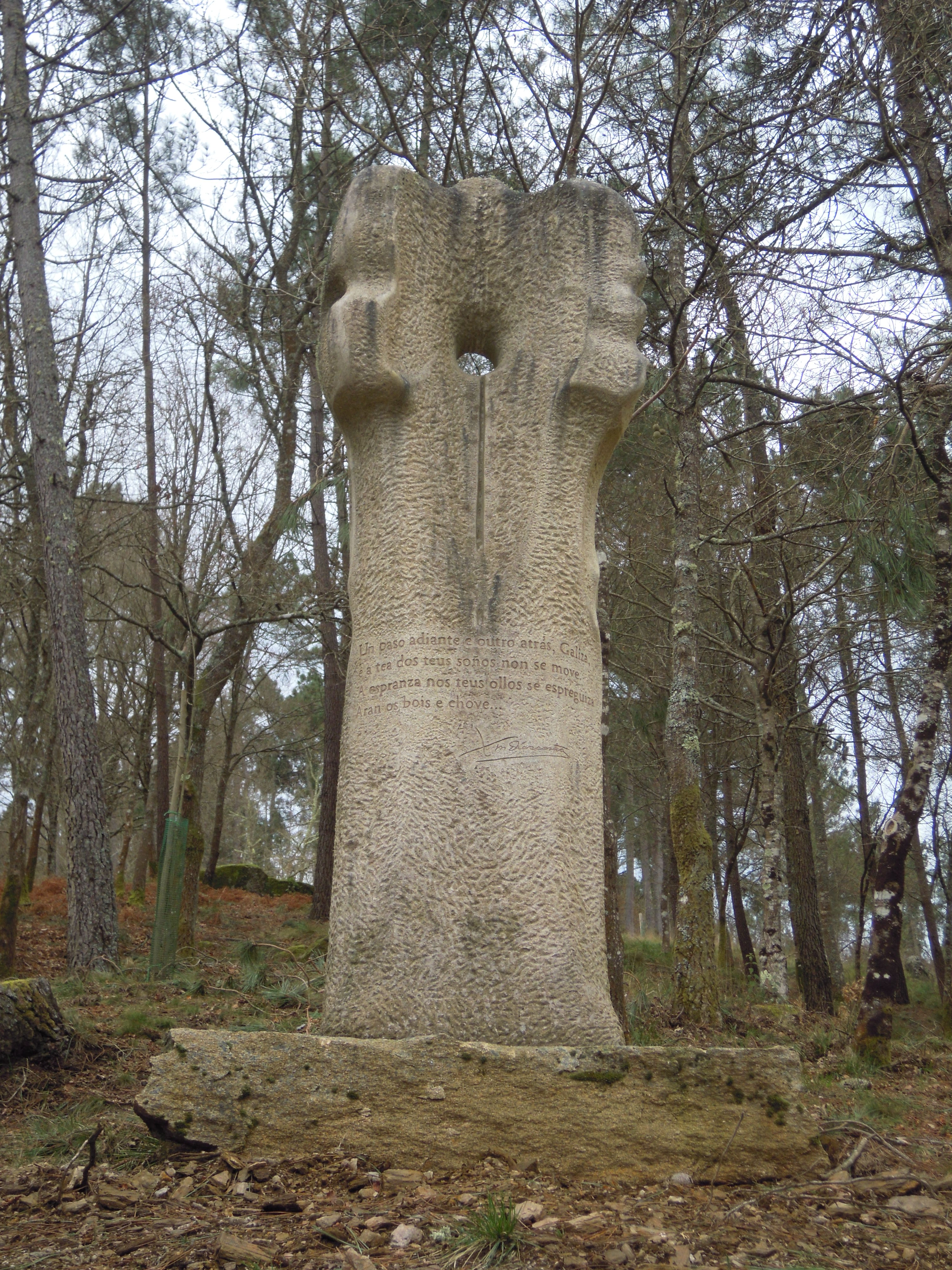 Escultura co poema "Penélope" de Xosé María Díaz Castro na Insua dos Poetas